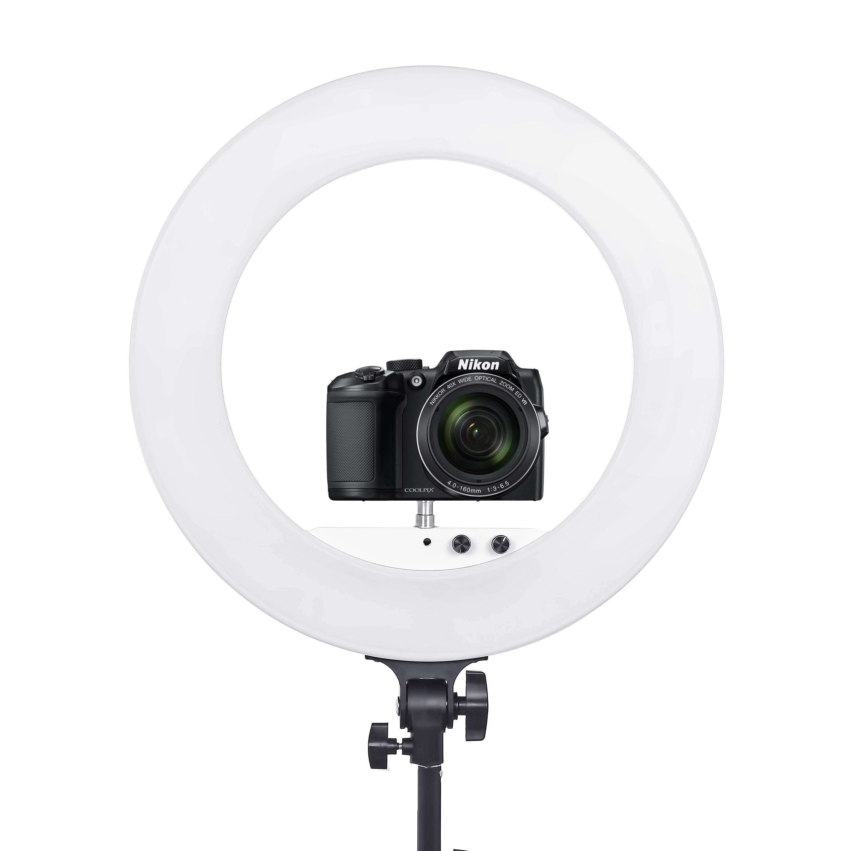 Общий вид кольцевой лампы с фотоаппаратом внутри. На фото модель компании LF R-480 мощностью 100 Ватт.